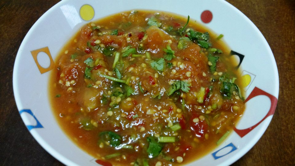 မြန်မာဘာသာ: ခရမ်းချဉ်သီး ပန်ထွေဖျော်